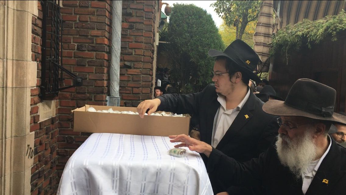 מנהגו של הרבי מליובאוויטש (על פי מנהג ישראל) לחלק לפני יום הכיפורים פרוסת עוגת דבש (הנקראת "לעקאח") בצירוף שטר של דולר לצדקה. הזרם המשיחי מאמינים שהוא עודנו חי וממשיך במנהגיו כולל "חלוקת הלעקאח". בתמונה נראה הרב זמרוני ציק מבת ים עובר בחלוקה כזו המתקיימת ביום הושענה רבה למי שלא קיבל לפני יום הכיפורים.